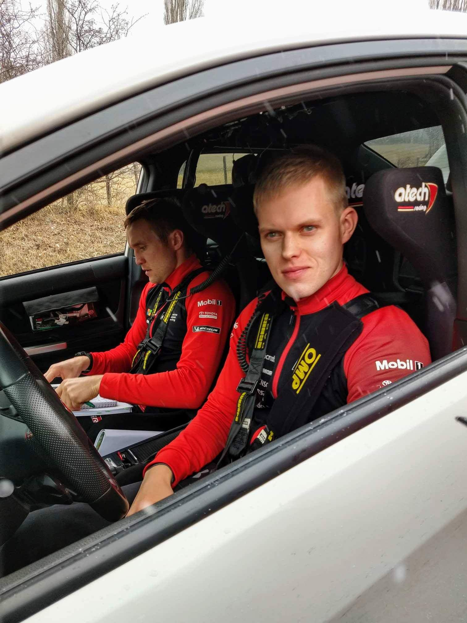 Ott Tänak et Martin Järveoja durant les reconnaissances du Rallye Monte-Carlo 2019.